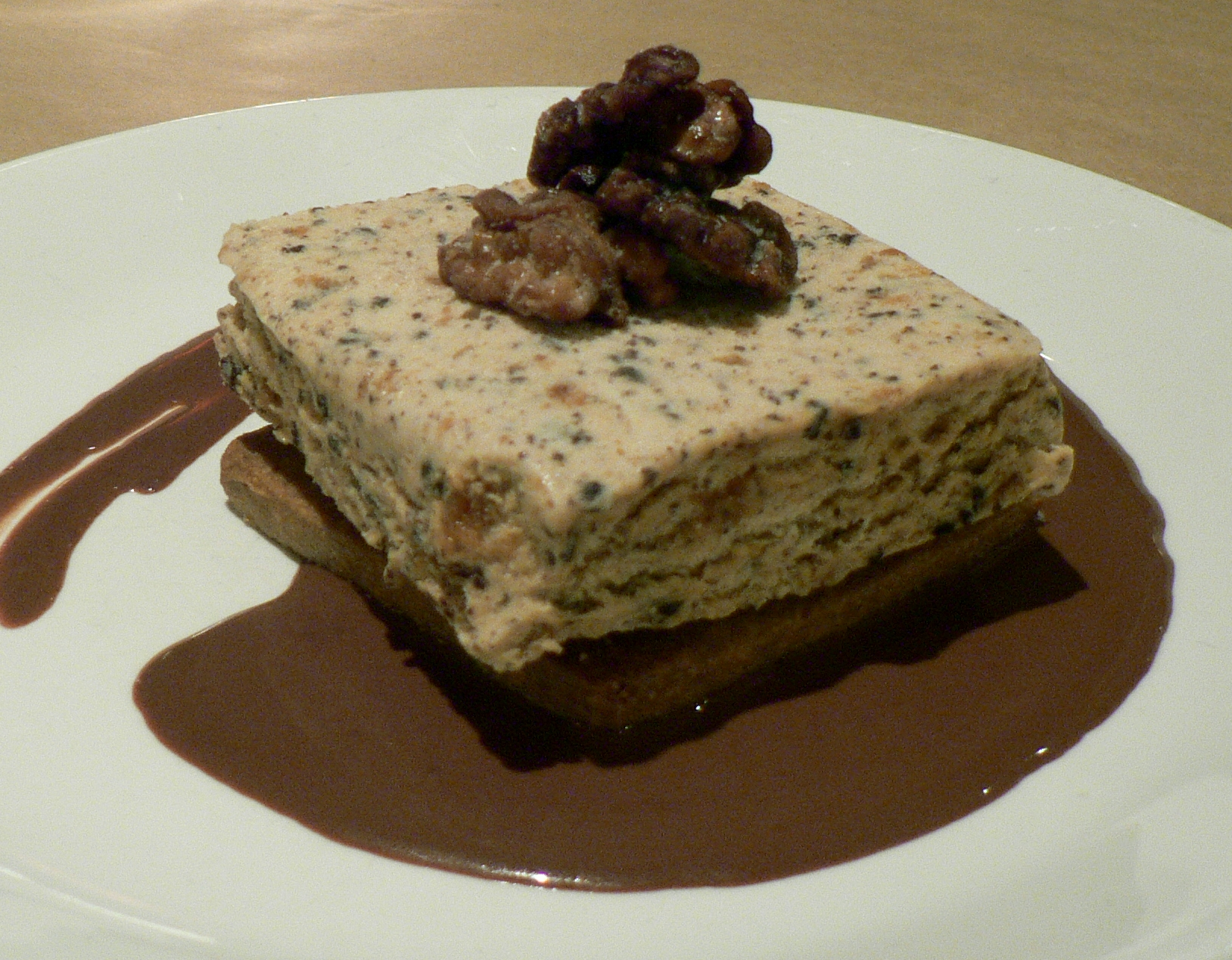 semifreddo